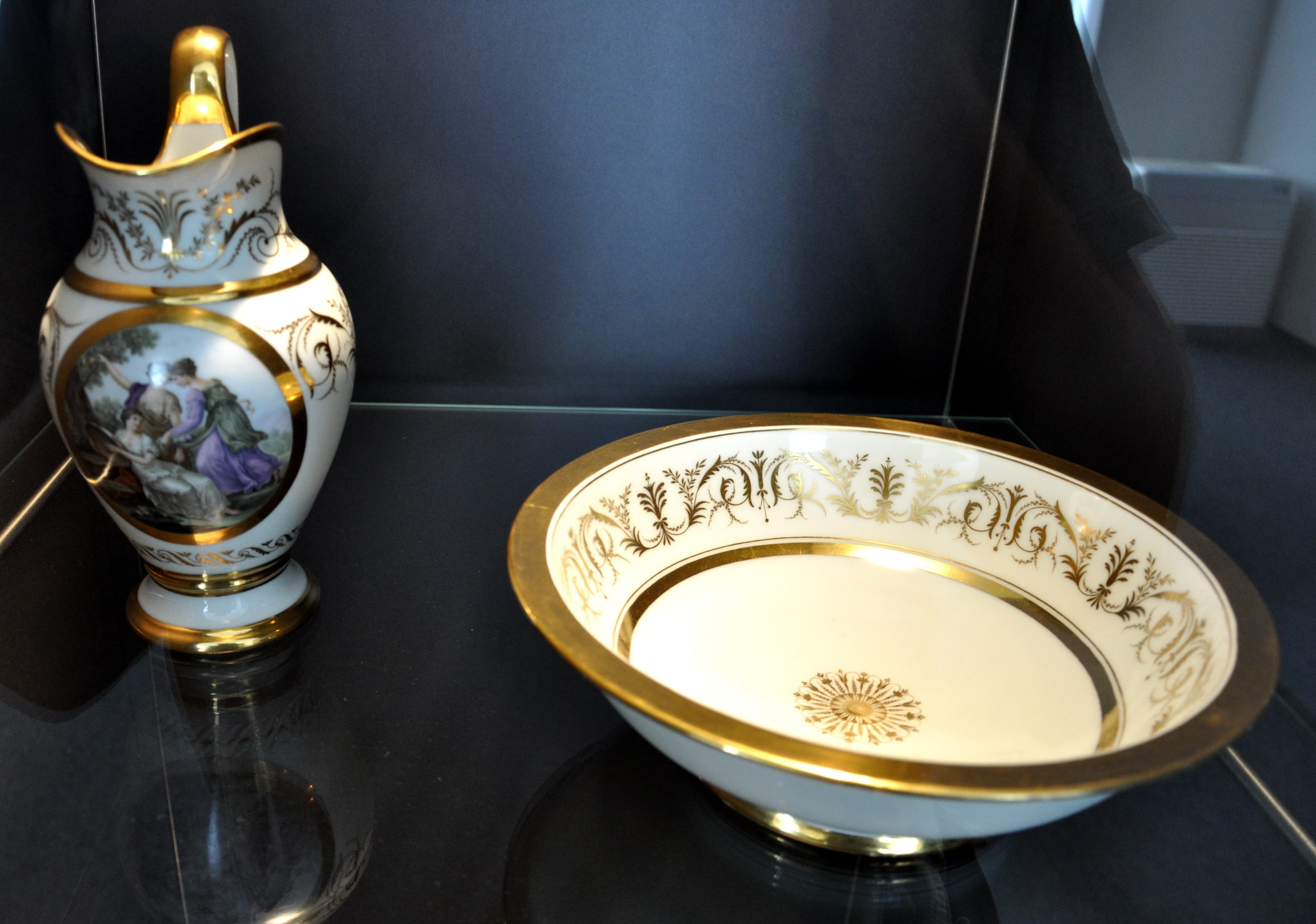 Waschgarnitur, Ludwigsburger Porzellan, 1805–1816 Ausstellung "Das stille Örtchen – Tabu und Reinlichkeit bey Hofe" der Staatlichen Schlösser und Gärten Baden-Württemberg, Bad Schussenried